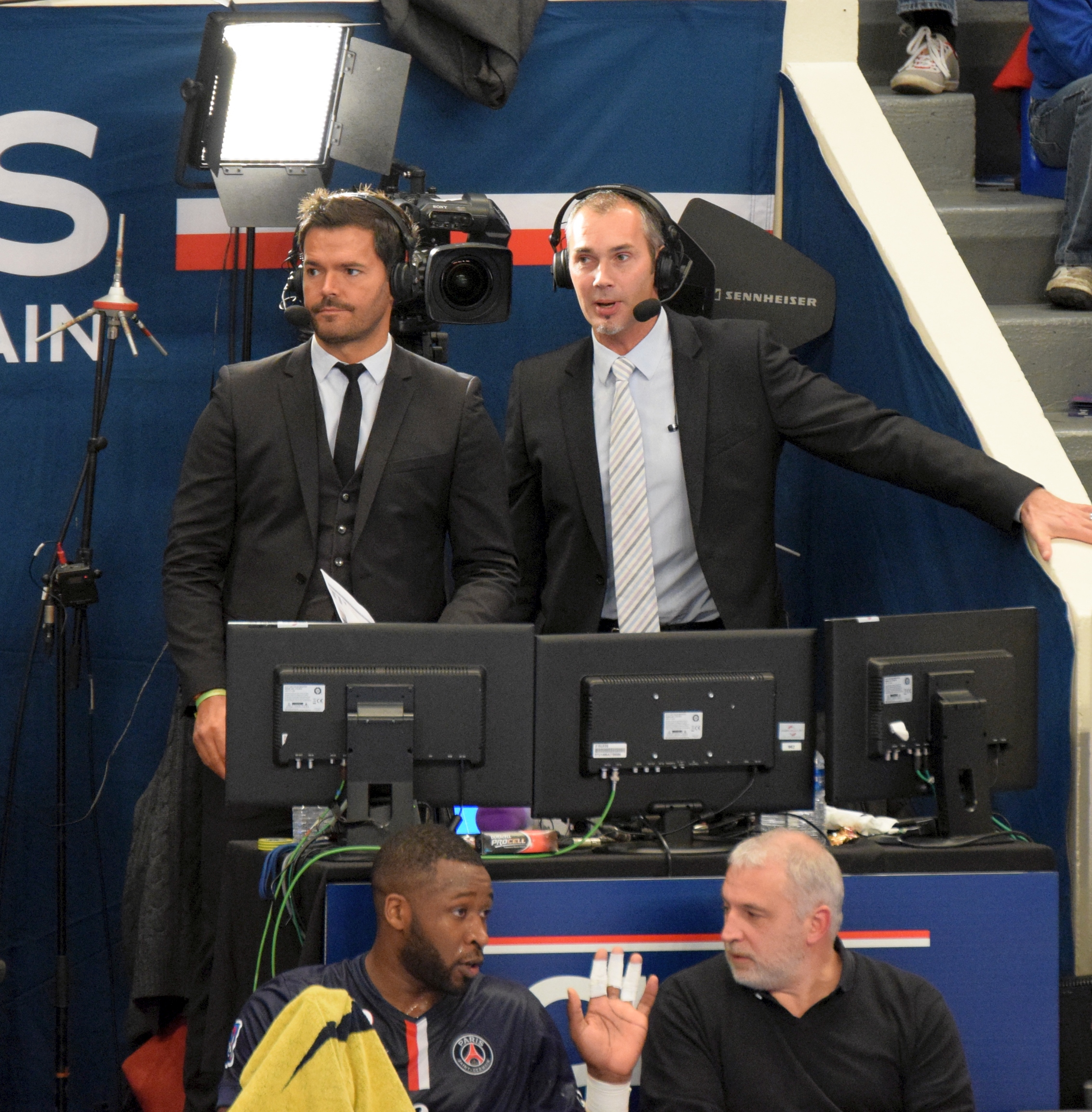 François-Xavier Houlet et Thomas Villechaize aux commentaires (pour BeIn Sports) du match de 1/4 de finale de Coupe de la Ligue de handball, PSG Handball - HBC Nantes. Le 09 novembre 2014 à Coubertin, Paris.